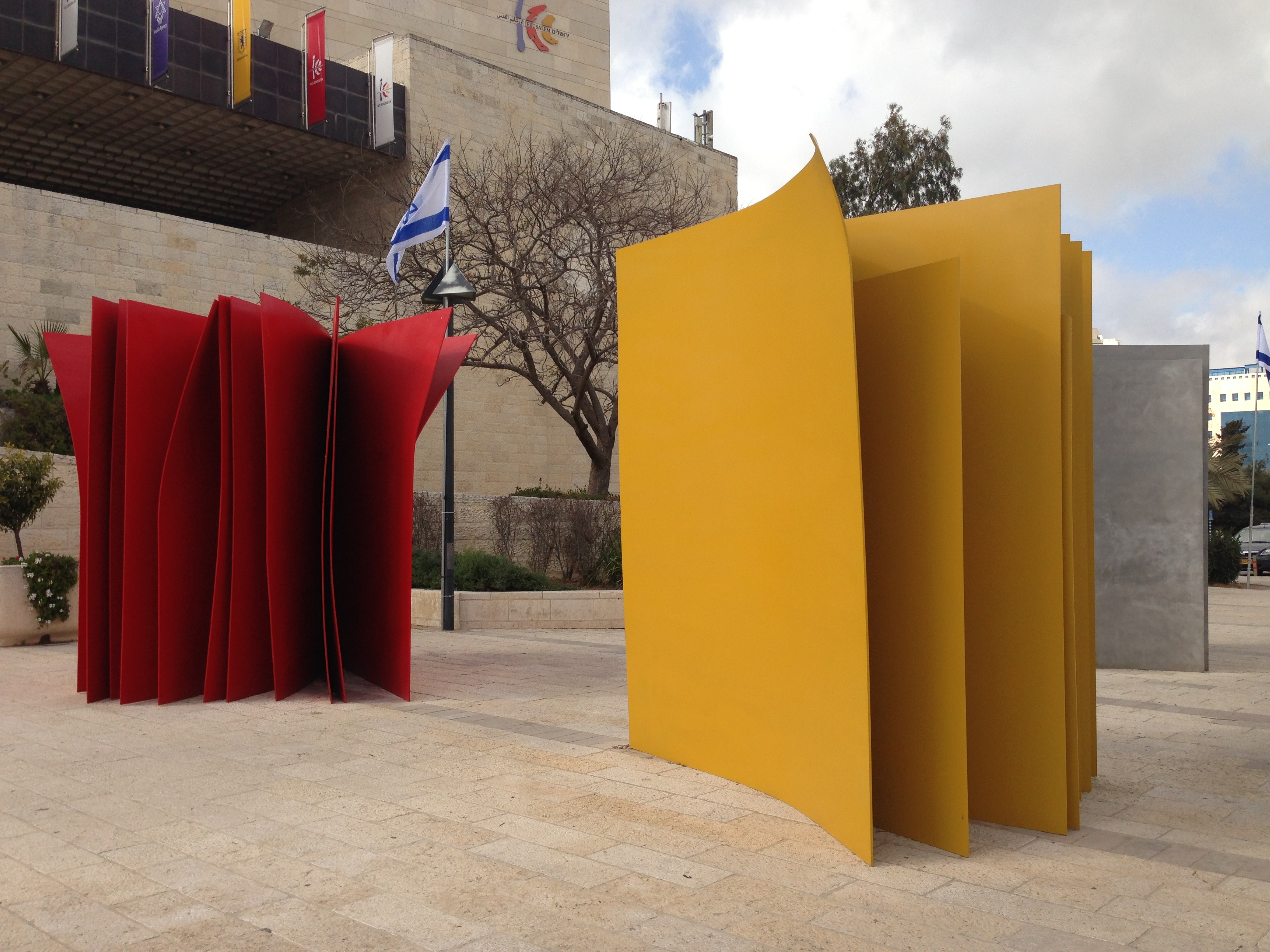 דינה רקנאטי דברים